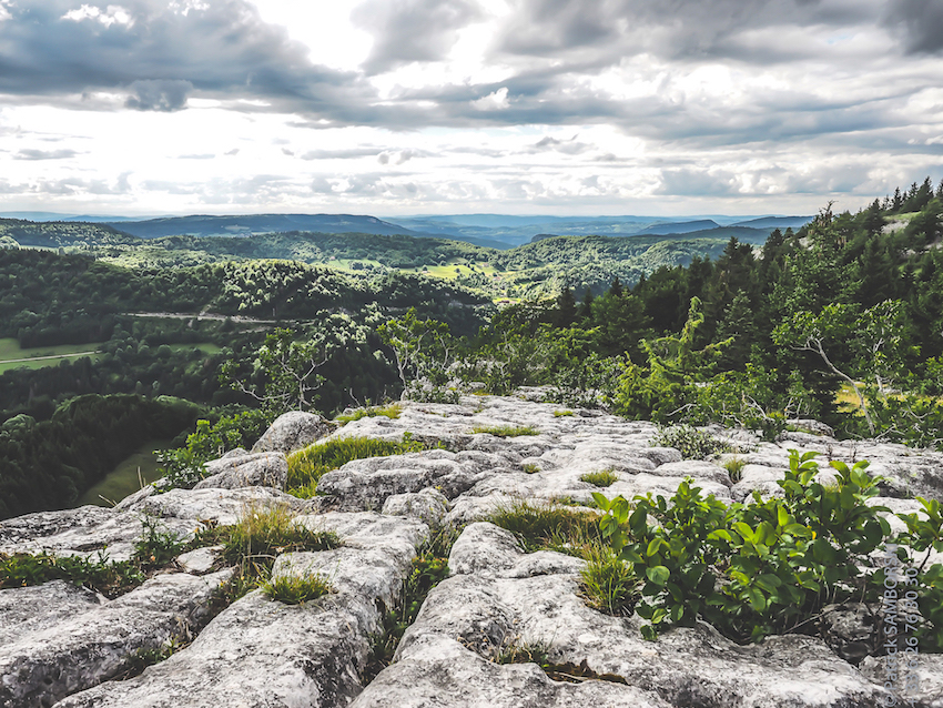 photo